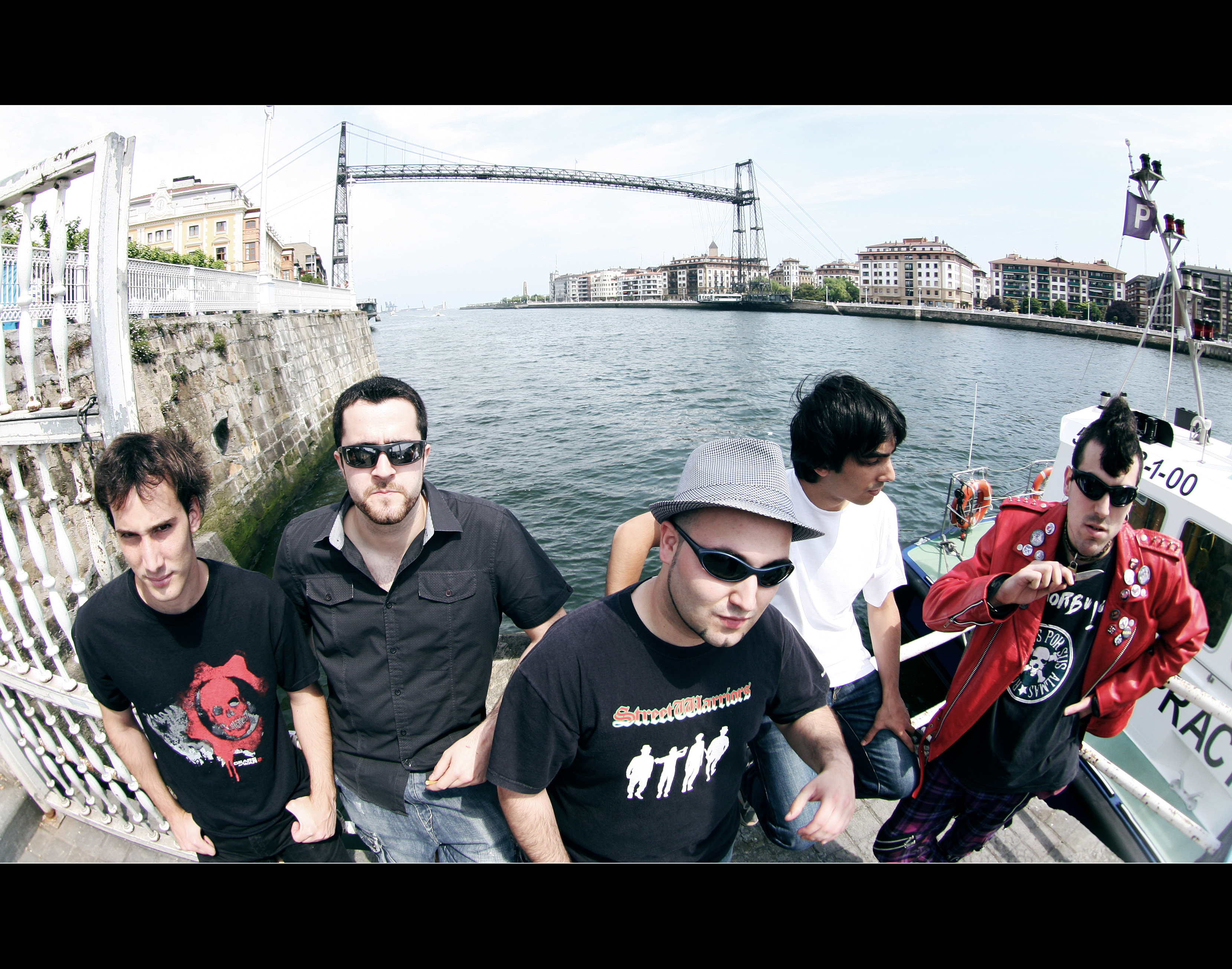 Manifa